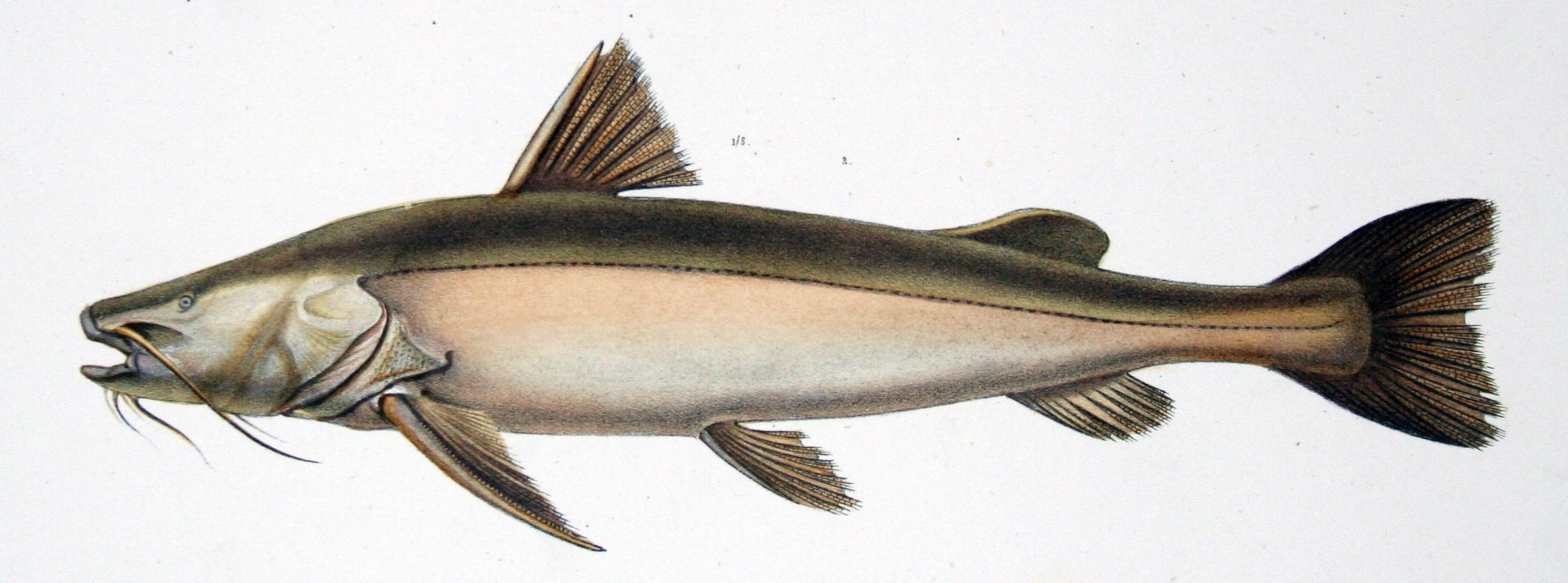 Bagrus flavicans Cast. = Zungaro zungaro (Humboldt, 1821)